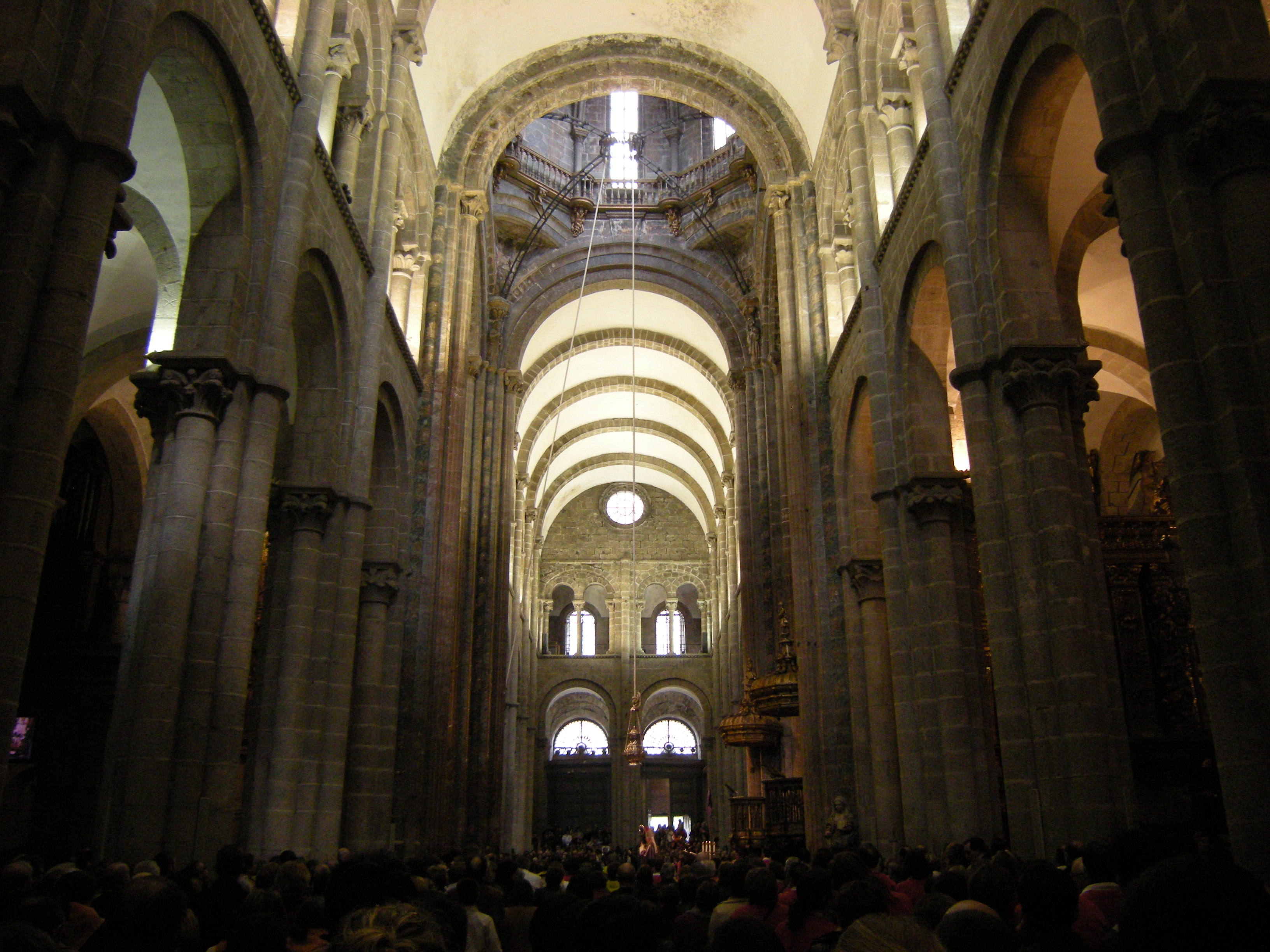 Vista de las naves del transepto.